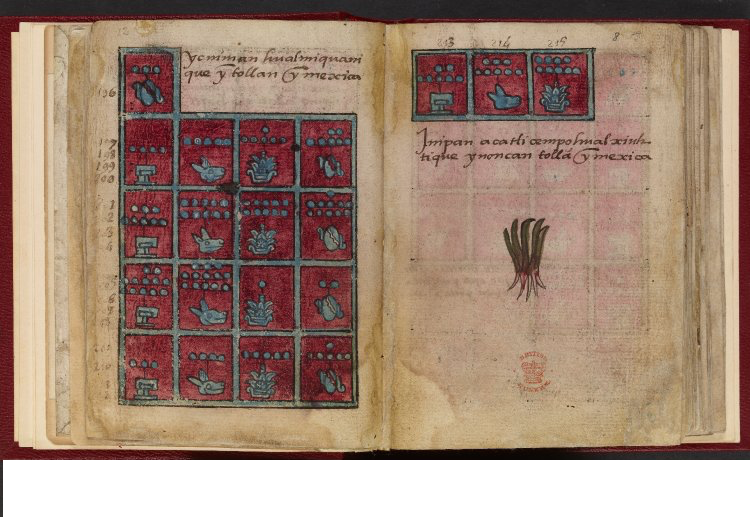 Pagina 112 del Codice Aubin